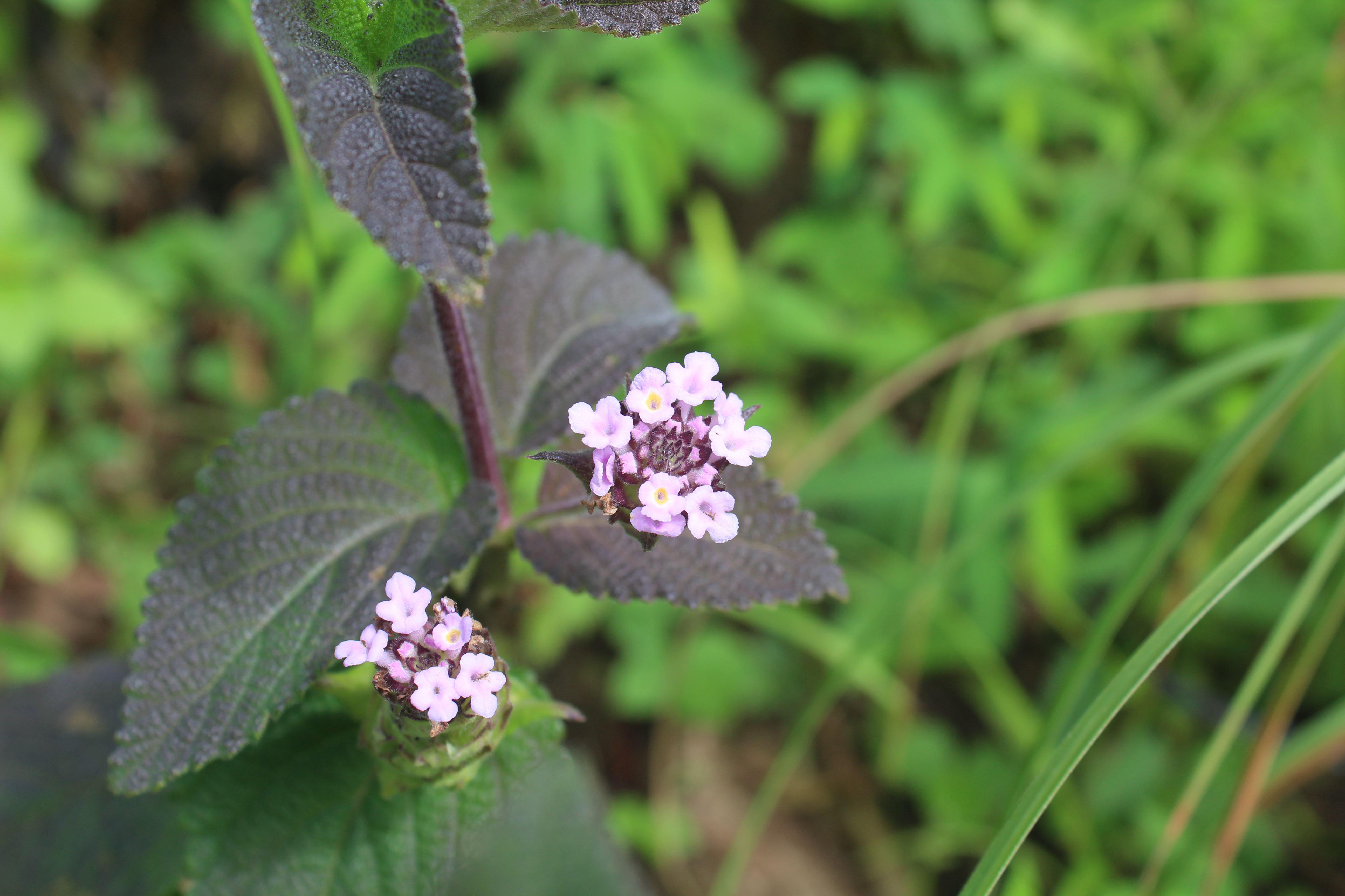 അരീപ്പൂ